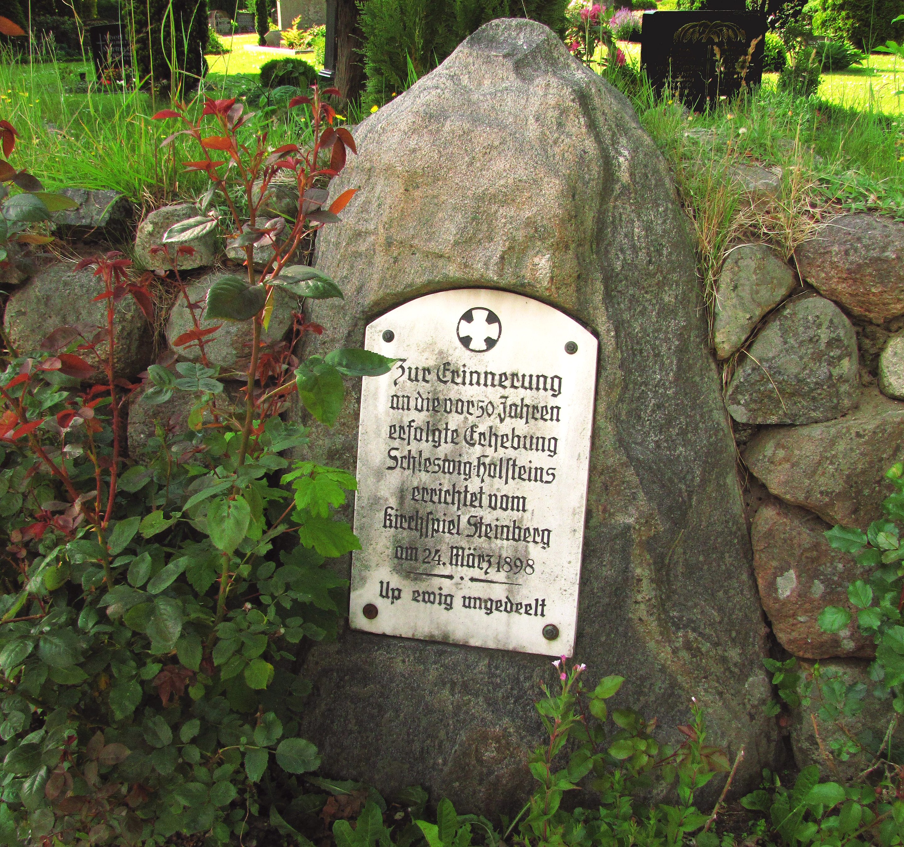 Gedenkstein von 1898 wegen des 50. Jahrestages der Erhebung Schleswig-Holsteins 1848 bis 1851, gestiftet vom Kirchspiel Steinberg (Schleswig), aufgestellt in Steinbergkirche - Foto 2012 Wolfgang Pehlemann IMG_7152